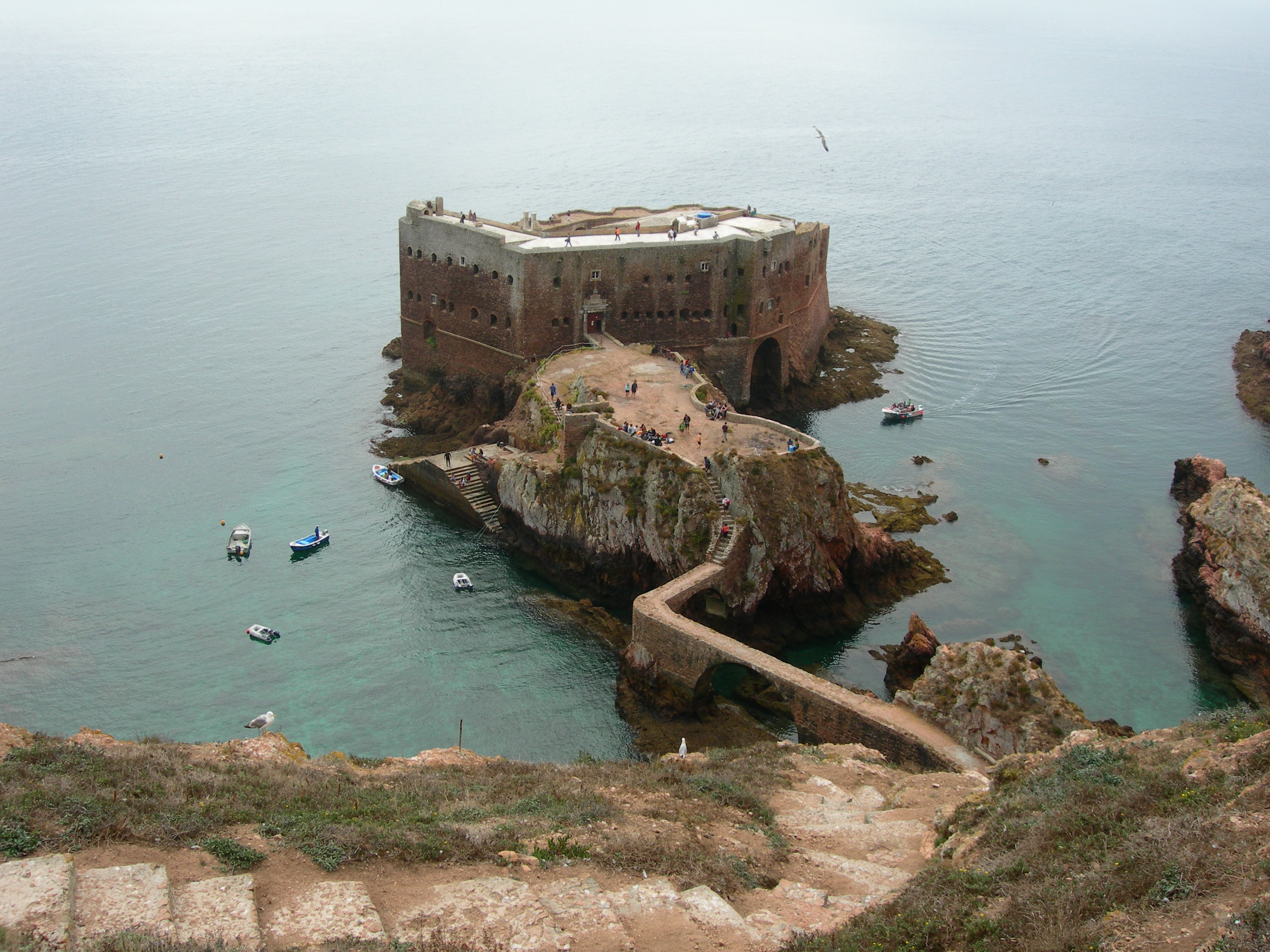 Forte de São João Baptista (Ilha da Berlenga) This file was uploaded for Wiki Loves Monuments in Portugal with the unique identifier 70299.